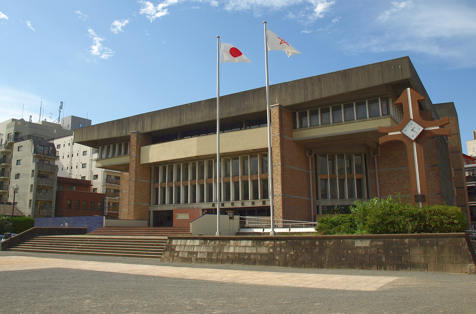 長崎県長崎市にある長崎市公会堂